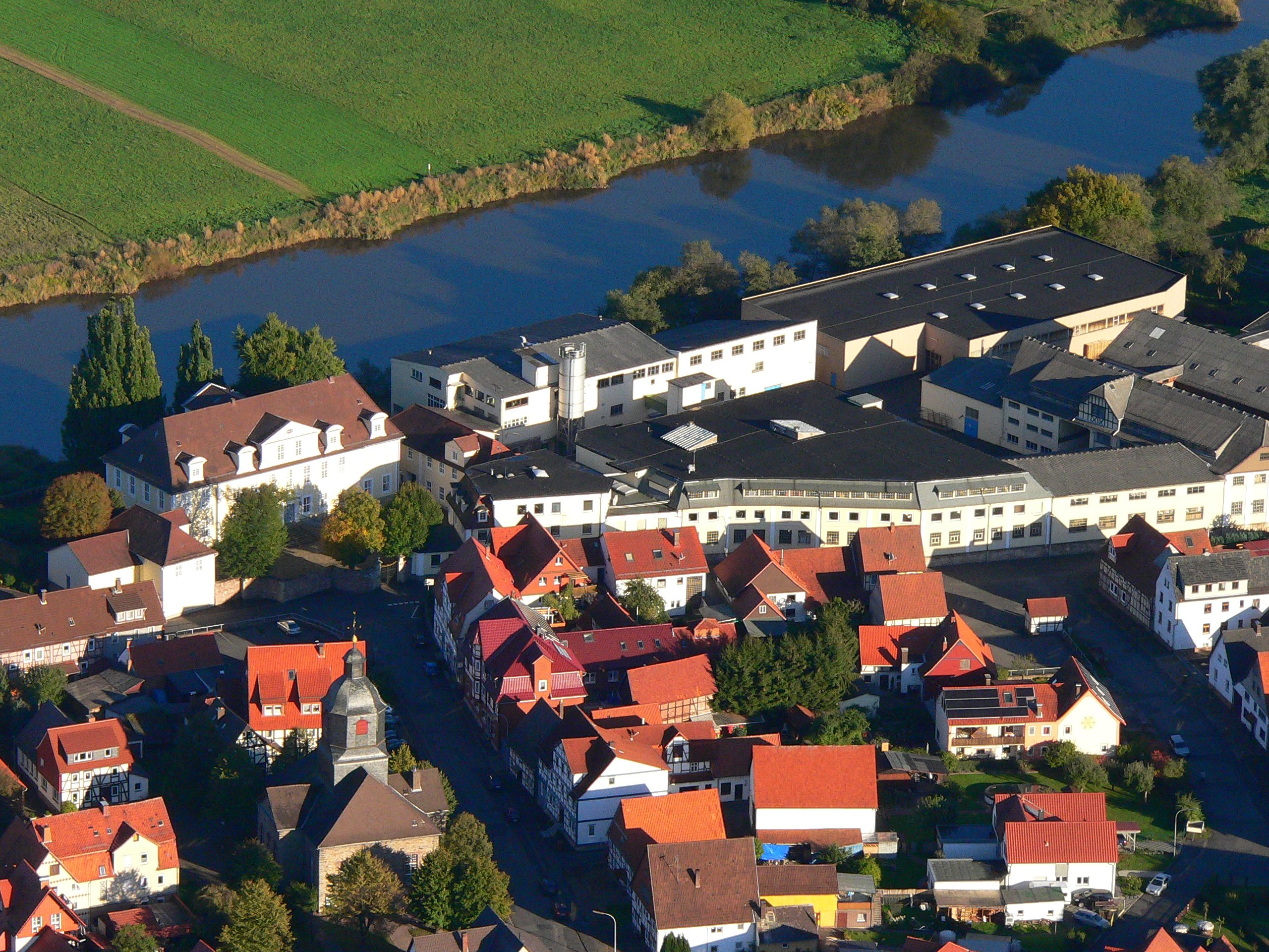 Jagdschloss Landgraf Carls in Reinhardshagen-Veckerhagen, Hessen, Deutschland (links oben am Weserufer). Rechts daneben die Farbenfabrik G. E. Habich´s Söhne auf dem Areal der ehemaligen Burg. Links im Vordergrund die evangelische Kirche. Aufnahme aus einem Heißluftballon.